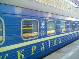 Фірмовий потяг "Україна" № 6/5 сполученням Київ — Москва